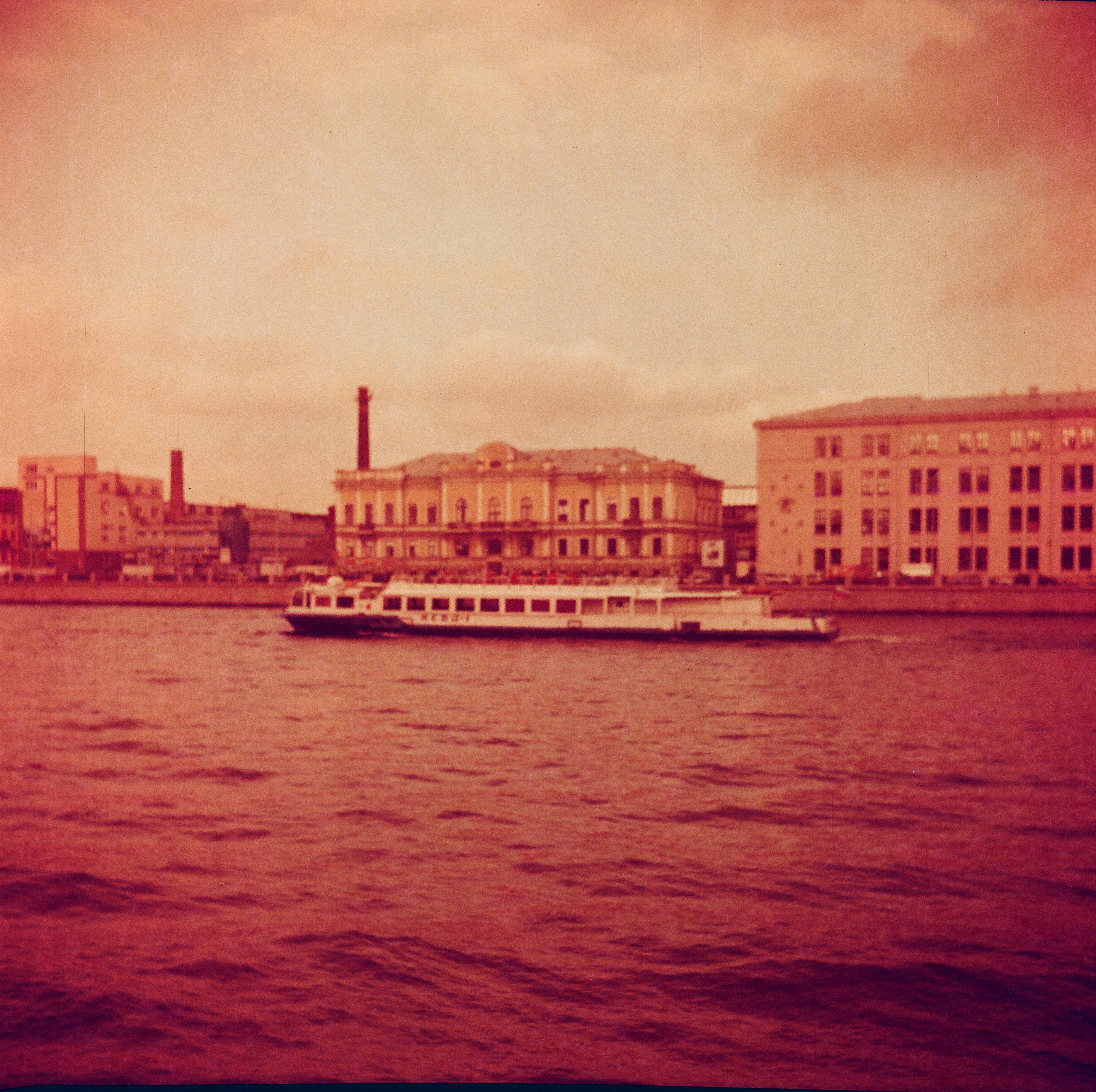 Особняк и заводоуправление лесопильного завода и льноджутовой мануфактуры Лебедева Д. Н. (Санкт-Петербург и Лен.область, Санкт-Петербург, Пироговская наб., 17)